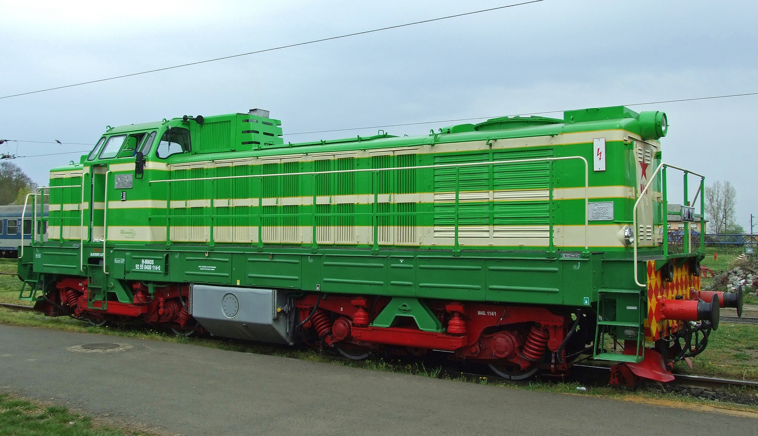 Nem sokkal a klasszikus helyreállítása után látható a 114-es Púpos Dombóváron.